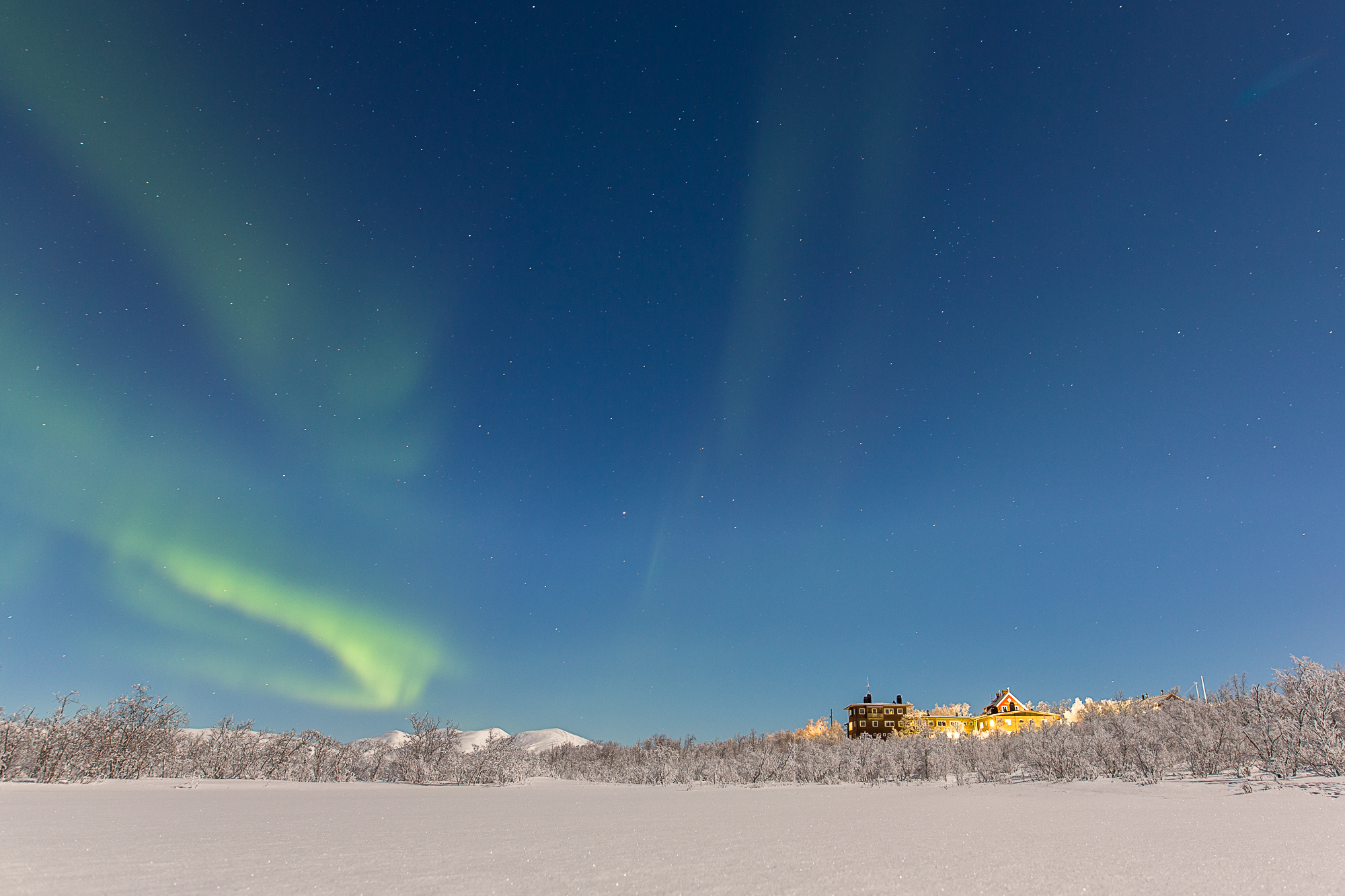 Climate Impacts Research Center